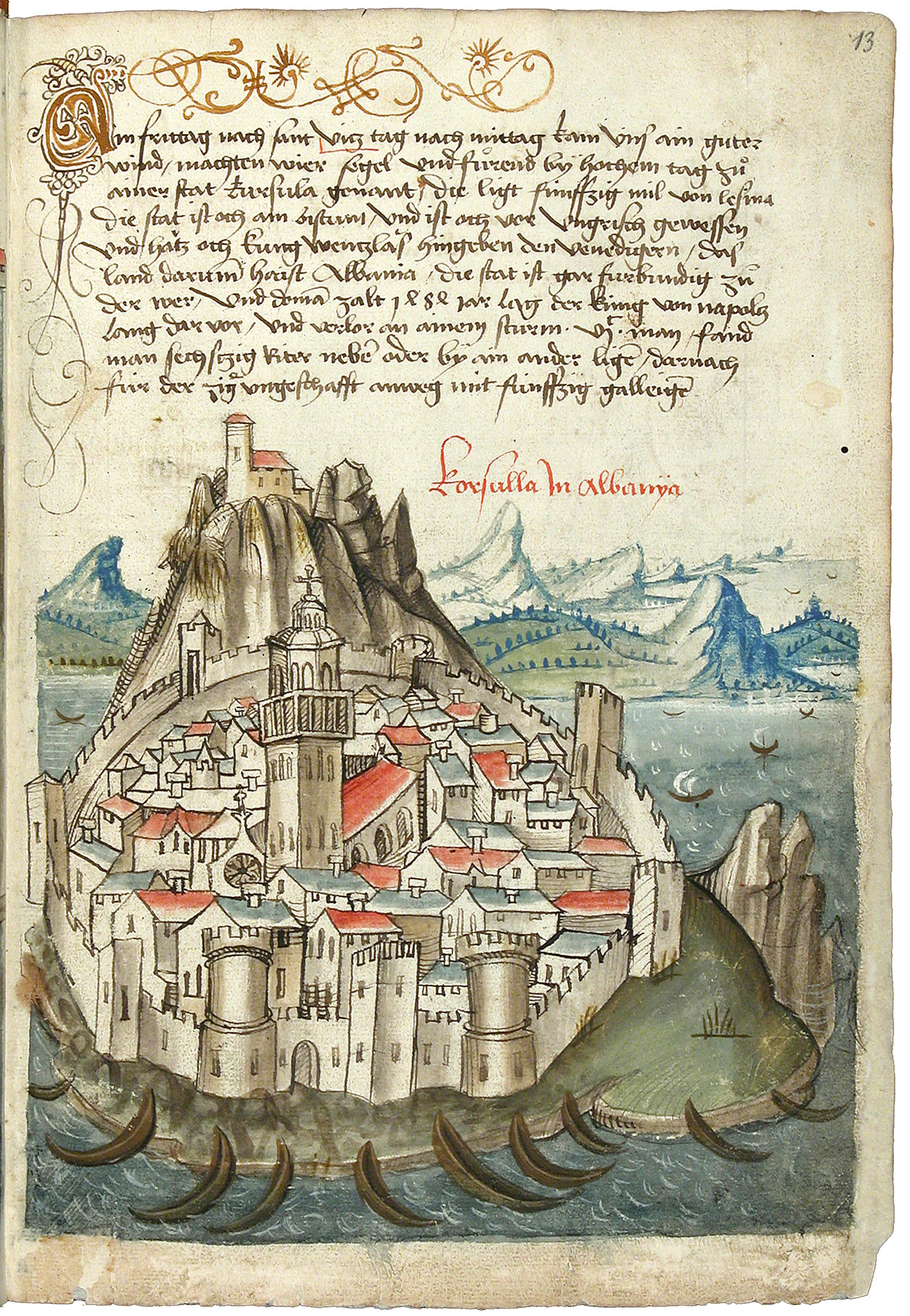 Schilderung einer Pilgerreise von Konstanz nach Jerusalem durch Konrad von Grünenberg, um 1487 Konrad von Grünenberg: Beschreibung der Reise von Konstanz nach Jerusalem - Cod. St. Peter, pap. 32. Handschrift, Bodenseegebiet (Konstanz?), um 1487. II + 53 Blätter, 32x21, mit 31 kolorierten Zeichnungen der Reiseroute von Venedig bis Palästina. Text in alemannischer Mundart.